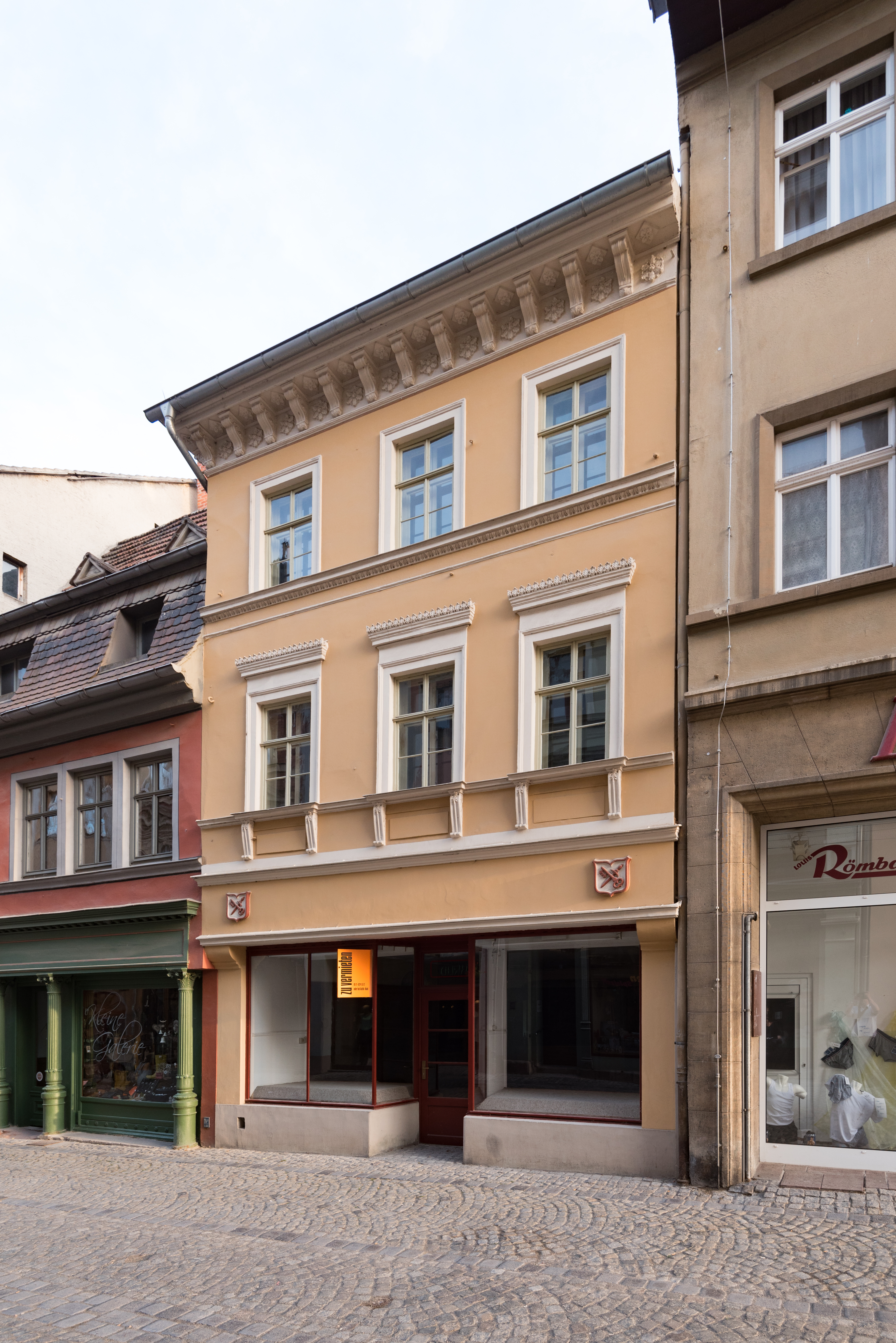 Naumburg (Saale), Herrenstraße 14